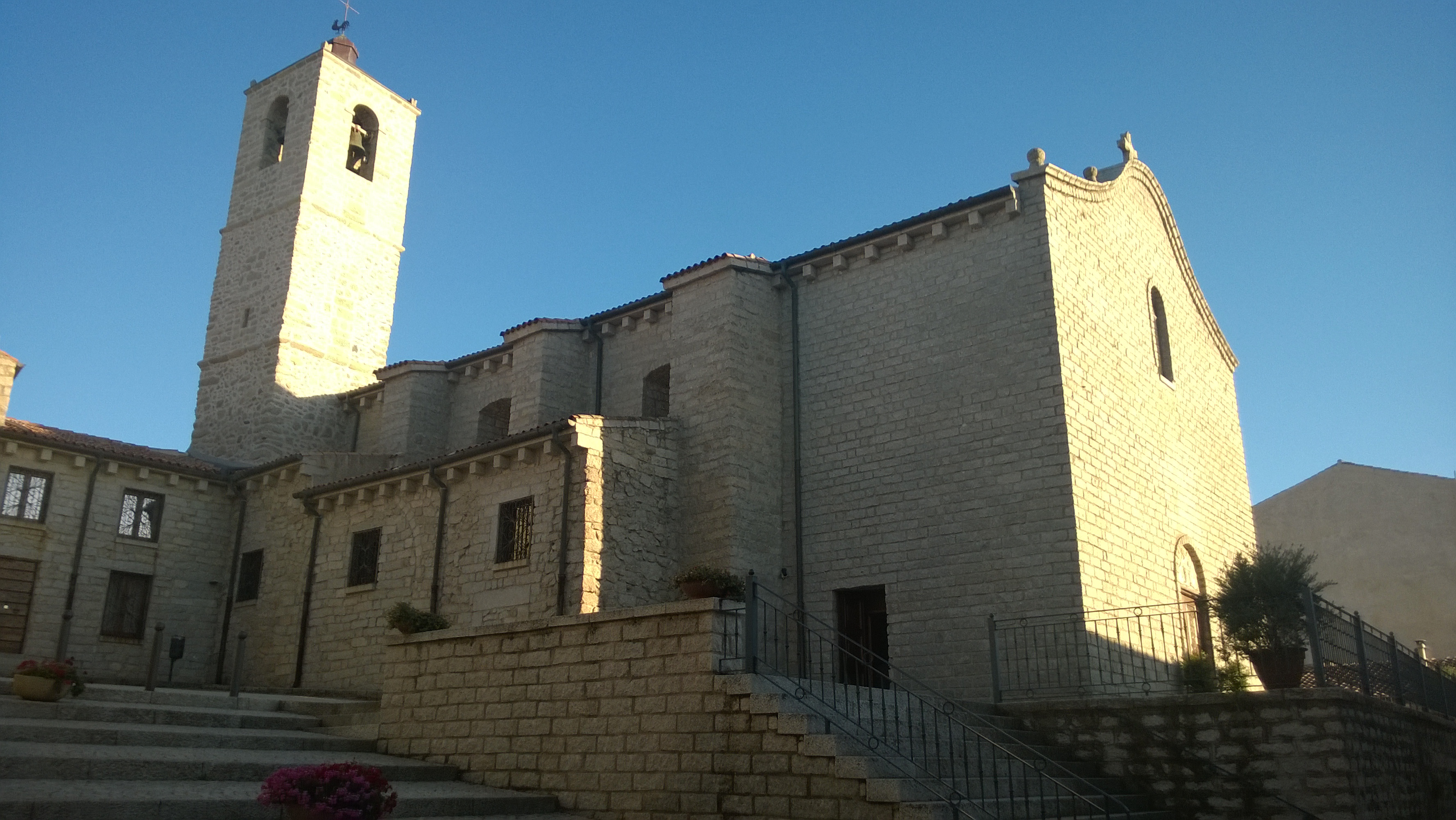 La chiesa parrocchiale di Santa Giusta, a Calangianus. Situa sul colle Santa Justa, ed è stata edificata nel 500.